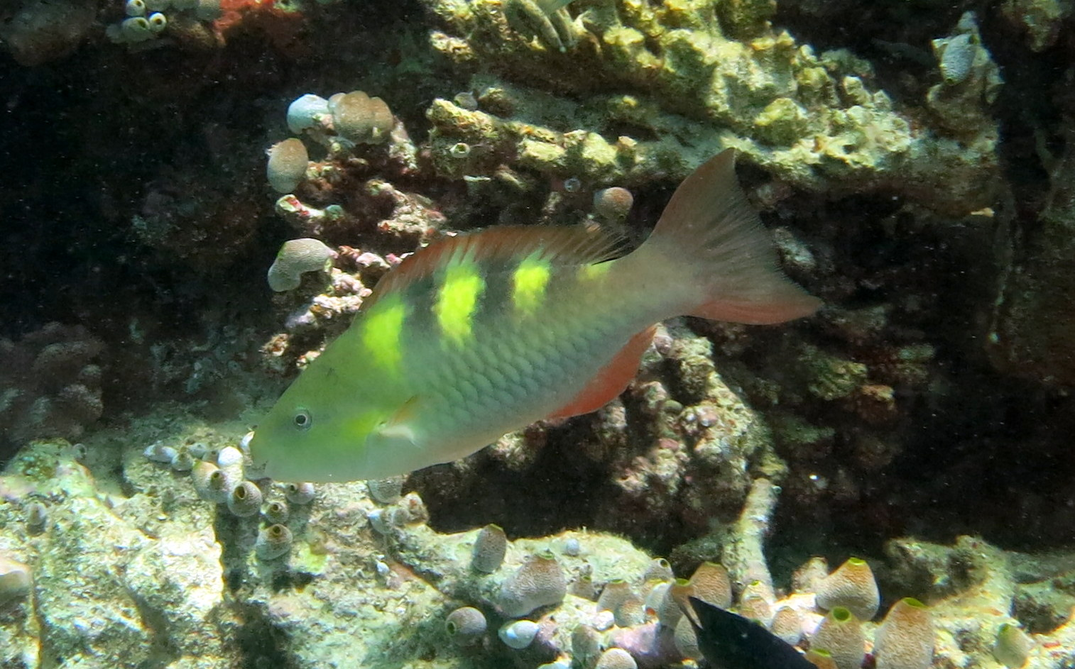 Un poisson-perroquet à cinq selles (Scarus scaber) femelle aux Maldives (atoll de Baa).